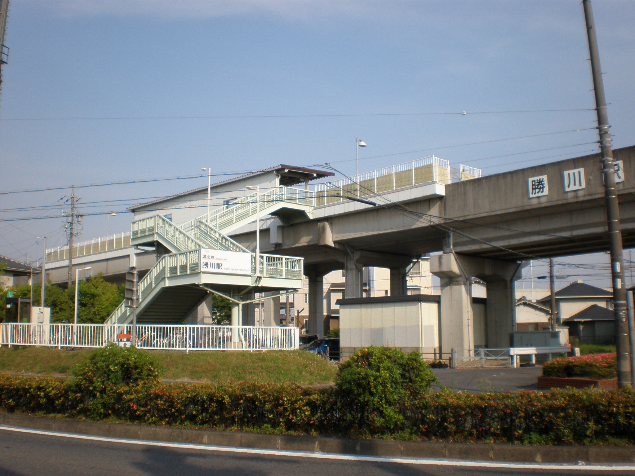 愛知県春日井市にある勝川駅（東海交通事業）